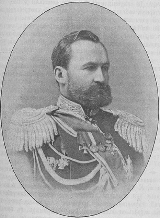 Начальник штаба Кавказского военного округа, Николай Николаевич Белявский.